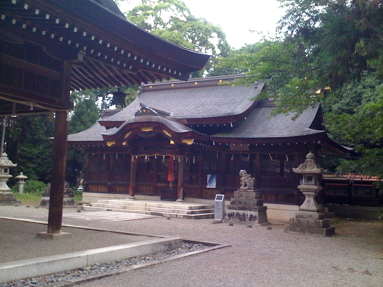 The Oka-jinja(Shinto shrine) in Higashiomi, Shiga, Japan